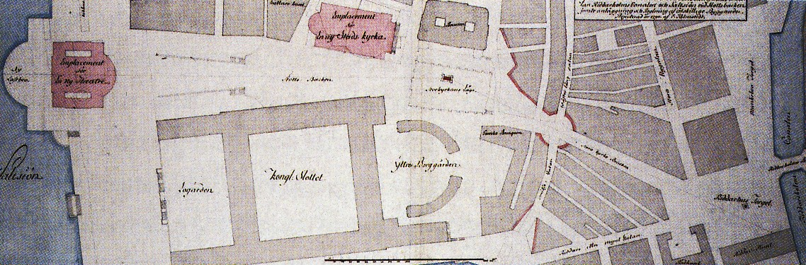 Förslag till generalplan i området krimg Stockholms slott, med bl.a. ny stadskyrka